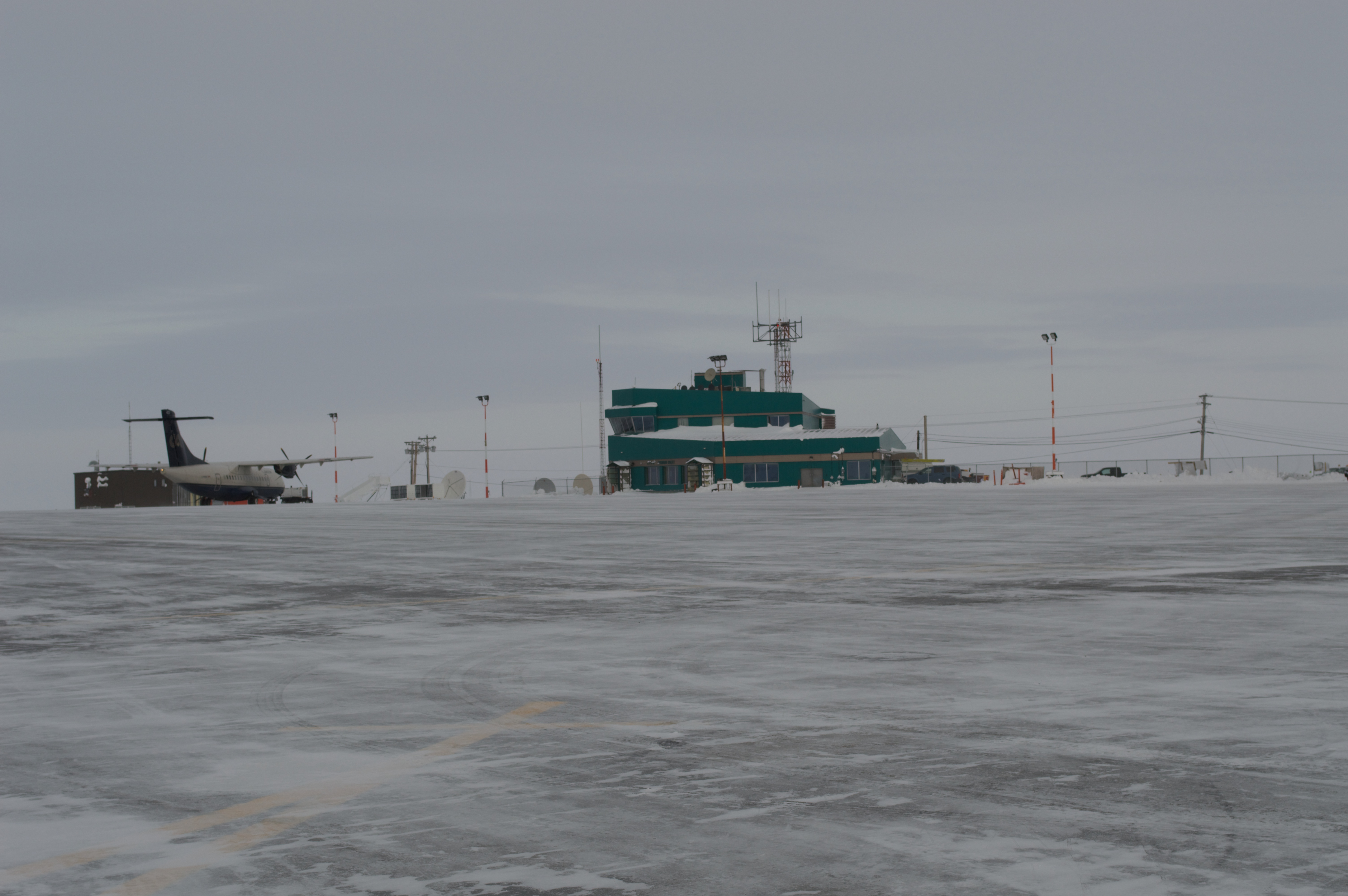 Rankin Inlet, Nunavut